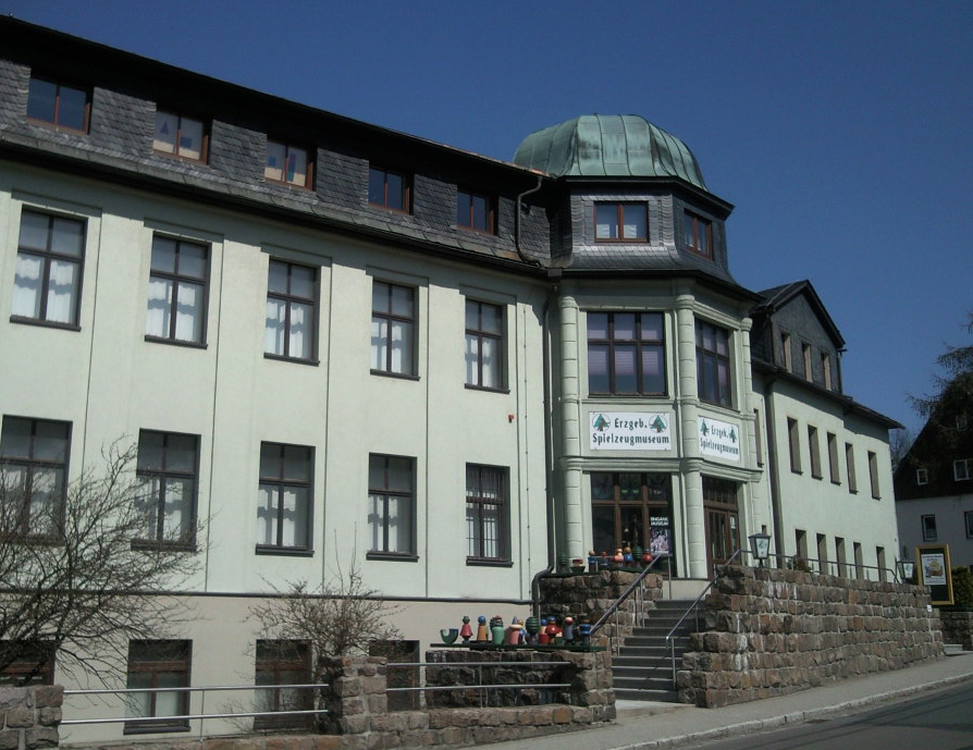 Erzgebirgisches Spielzeugmuseum Seiffen, Sachsen